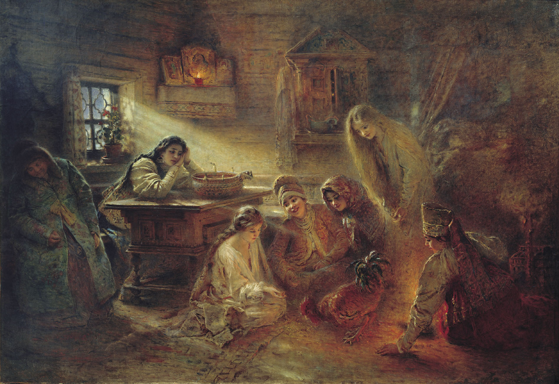 Святочные гадания В интерьере деревенской избы шесть девушек гадают: пятеро из них собрались вокруг петуха, клюющего зерно около девушки, сидящей слева, что должно предвещать ей скорое замужество. Левее у окна девушка сидит за столом, на столе – вода и свечи. Рядом на скамье сидит спящая пожилая женщина. Государственный музей истории религии. КП-22539, Холст, масло, 160 х 232 см